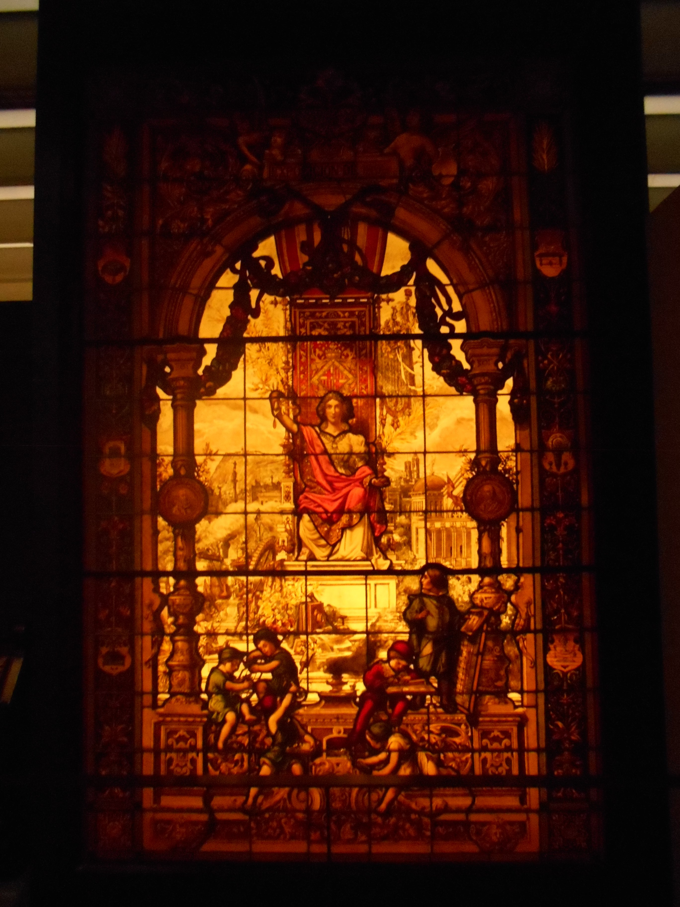 Alegoría de la III Exposición de Bellas Artes e Industrias Artísticas de Barcelona (1890-1903), de Antoni Rigalt, vidrio emplomado con pintura de grisalla y esmalte, Museo del Diseño de Barcelona.